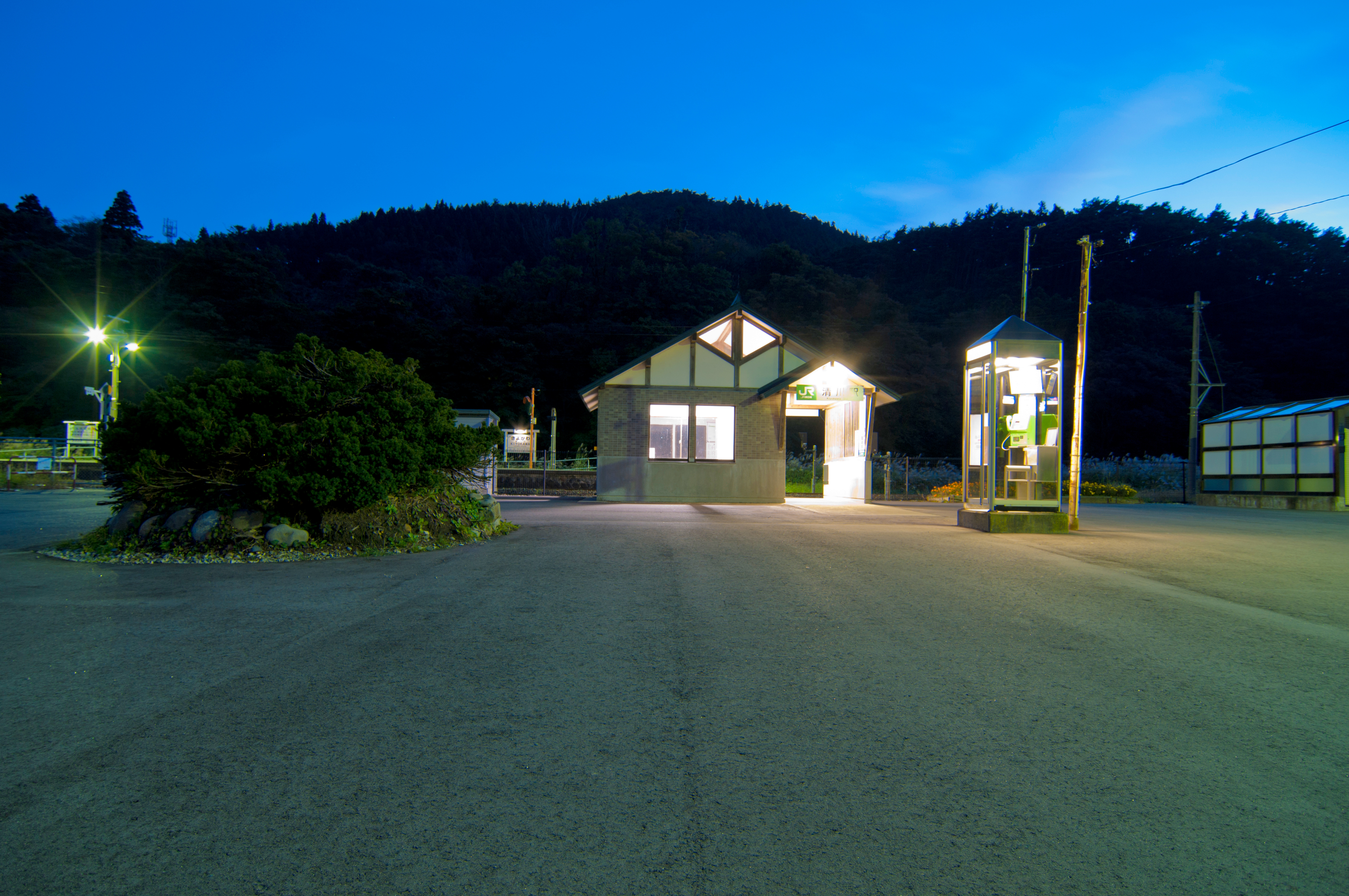 東日本旅客鉄道陸羽西線清川駅